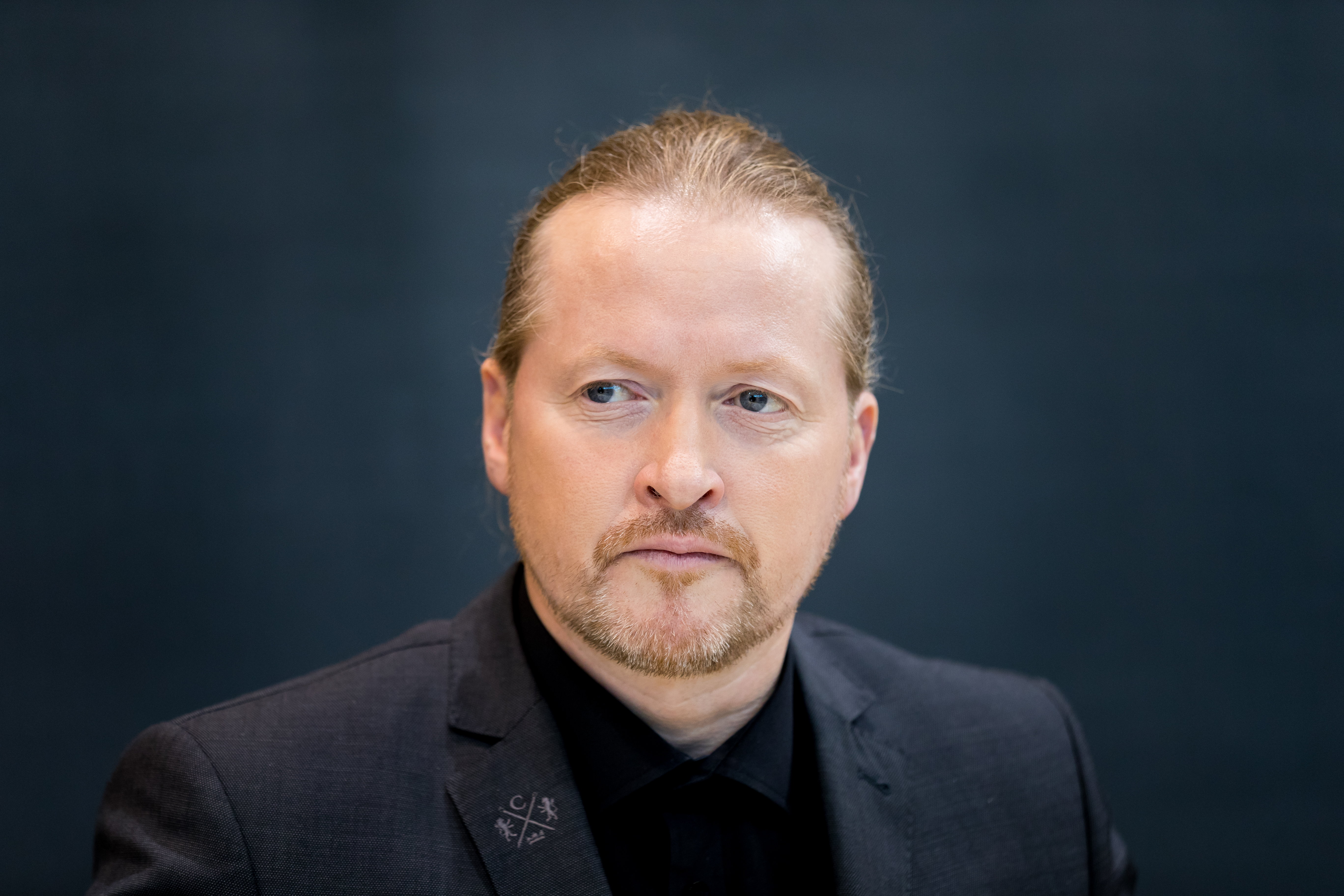 Joey Kelly during Buchmesse at Messegelände, Frankfurt, Hessen, Germany on 2017-10-14, Photo: Sven Mandel